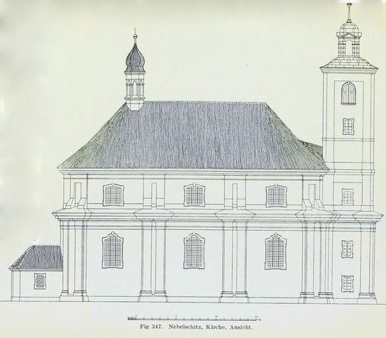 Hornjoserbsce: Napohlad Njebjelčanskeje cyrkwje swjateho Měrćina ze sewjera.